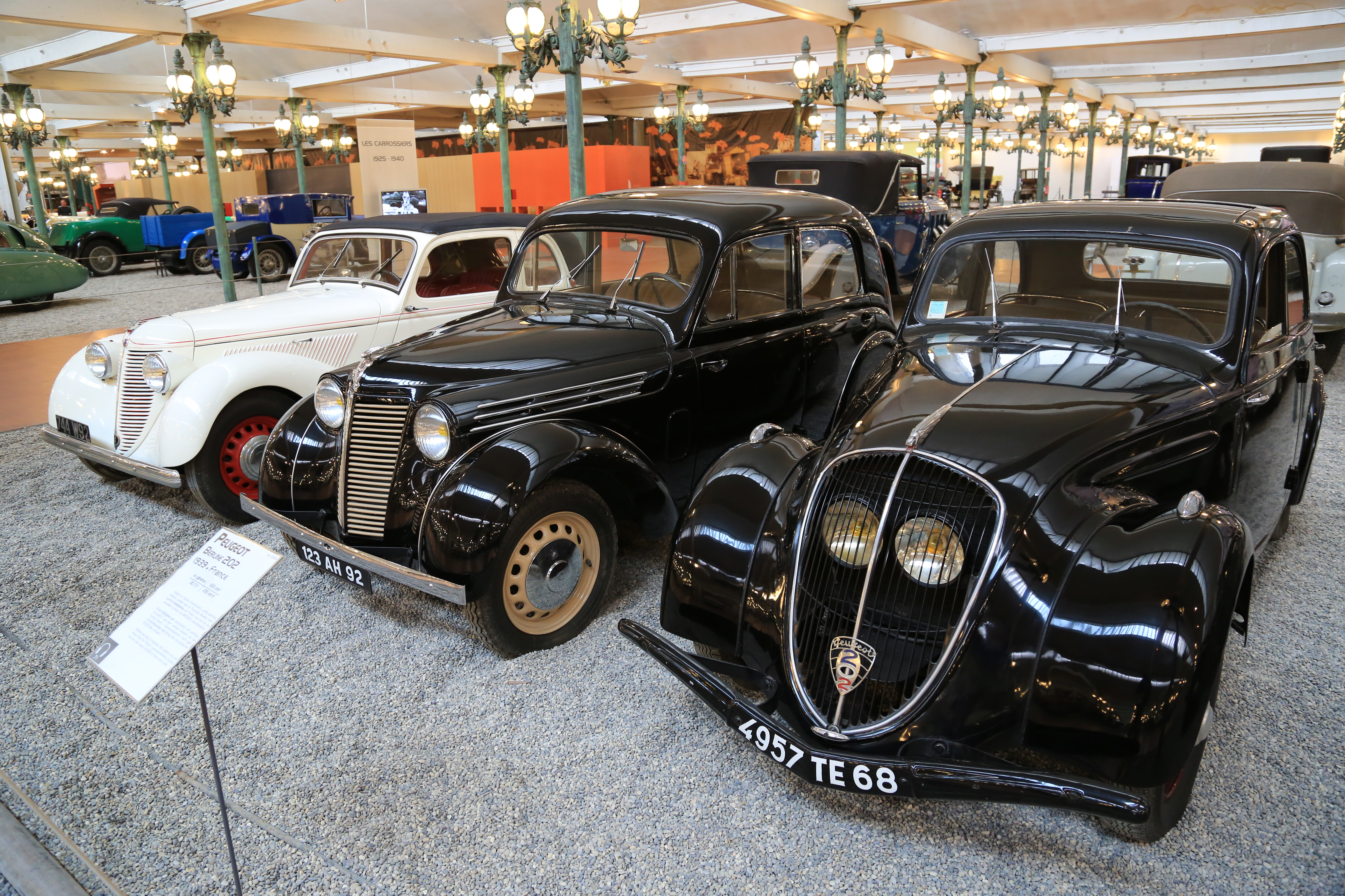 Musée de l'automobile - Mulhouse - Peugeot 202 - BH5A5862 left: Amilcar Compound 1938 centre: Renault Juvaquatre BFK 4 1946 right: Peugeot 202 1939